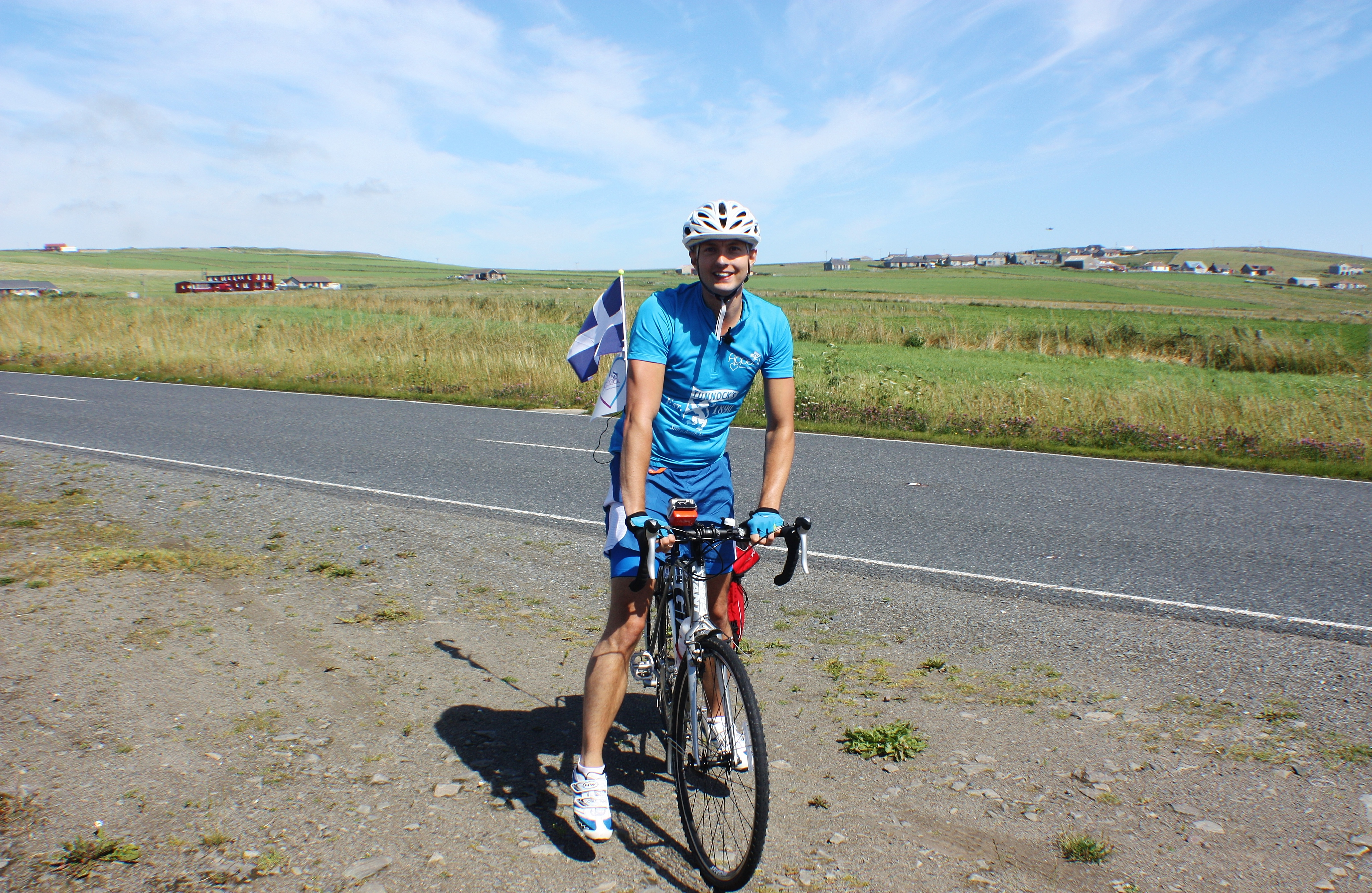 " Hi Sean " !